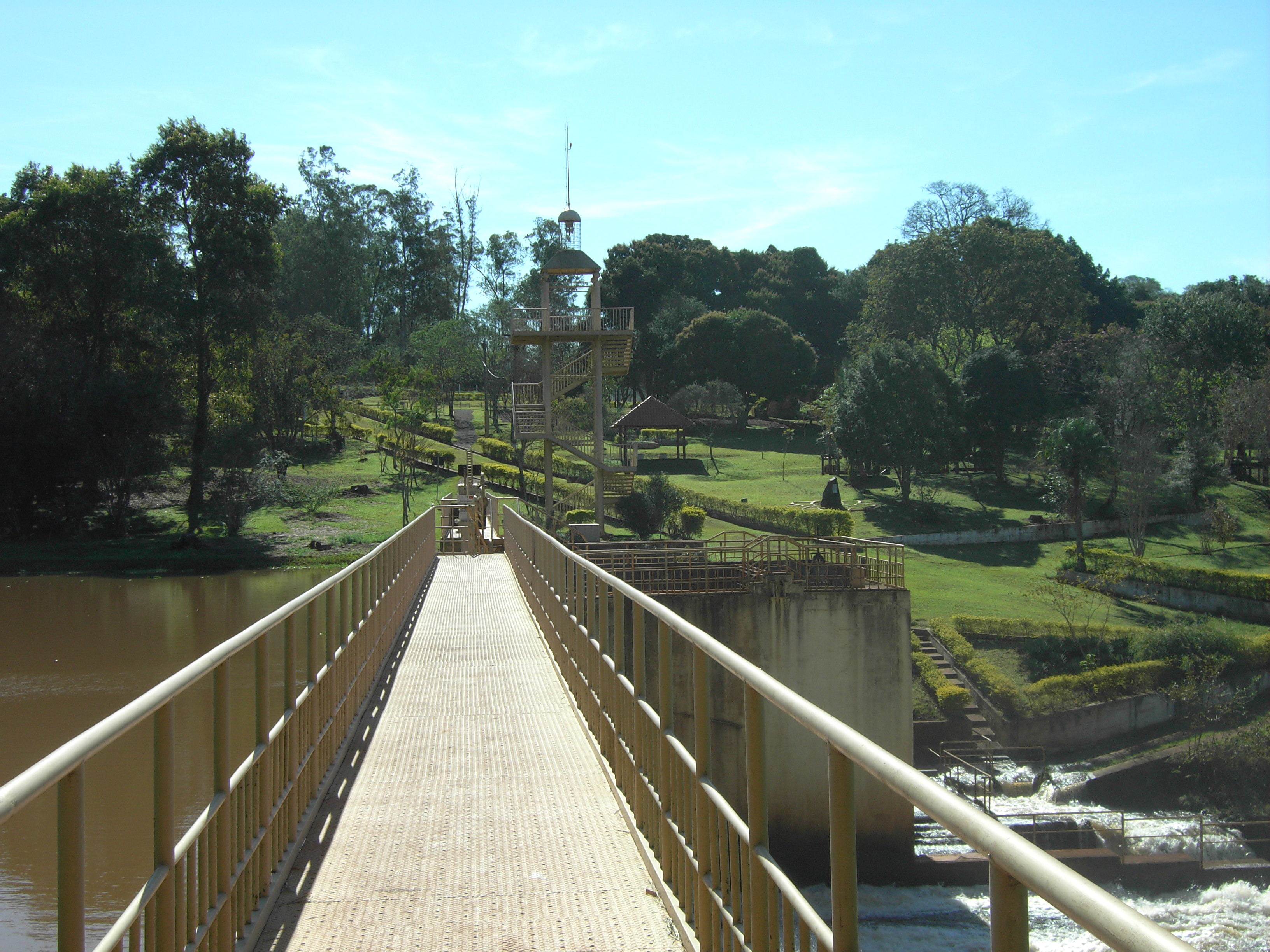 Template:Vista do Parque Daisaku Ikeda, Londrina-PR,Brasil